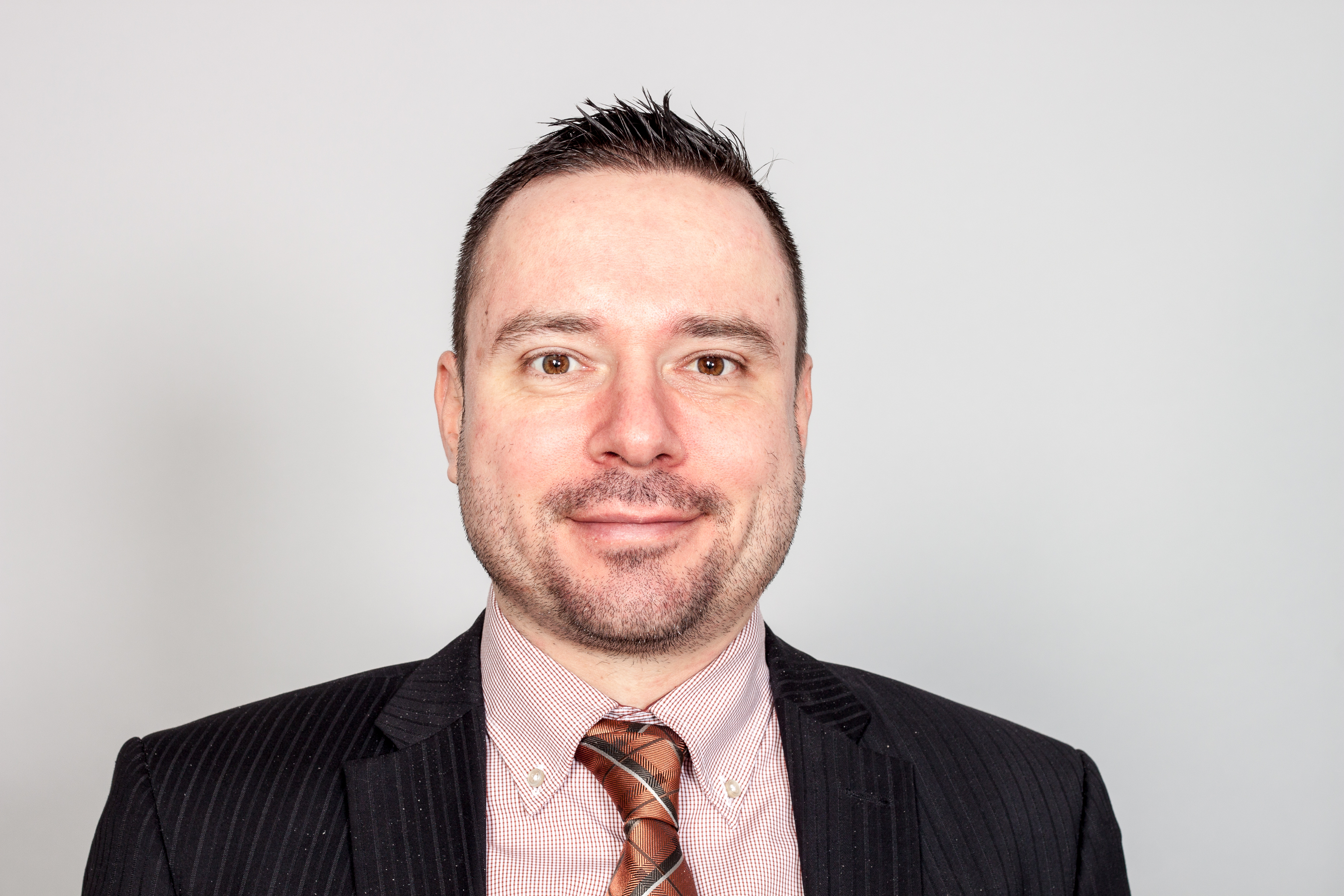 Landtagsabgeordneter Arne Schimmer